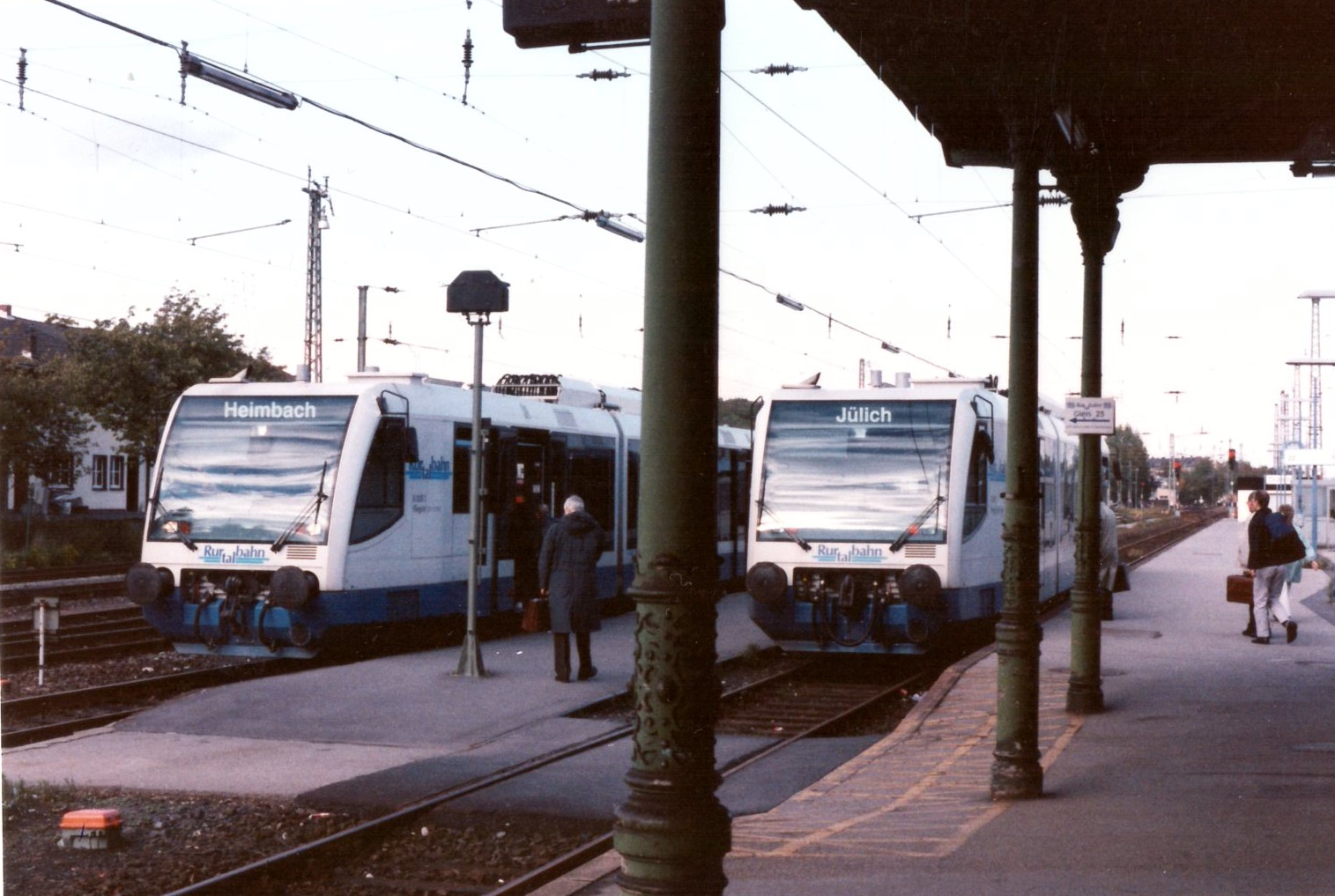 1996 konnten Züge von der Nordseite des Dürener Bahnhofs noch die Strecke nach Heimbach erreichen. Links eine Doppeleinheit RegioSprinter von Jülich nach Heimbach, rechts ein einfacher RegioSprinter von Düren nach Jülich, aufgenommen am 4. Oktober 1996 um 16.19 Uhr.